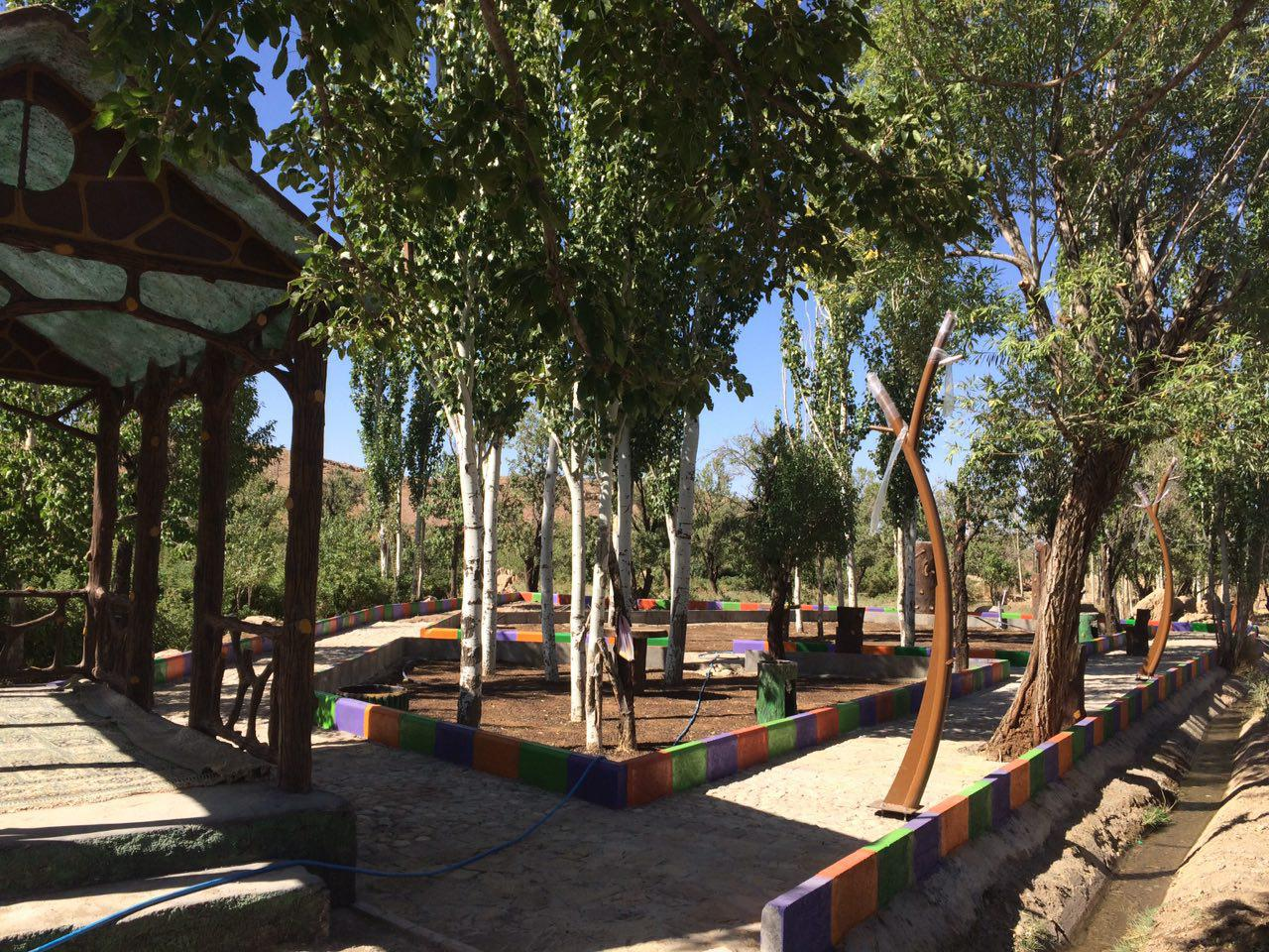 نخستین پارک ورکان، کاشان، ایران First Varkan park.